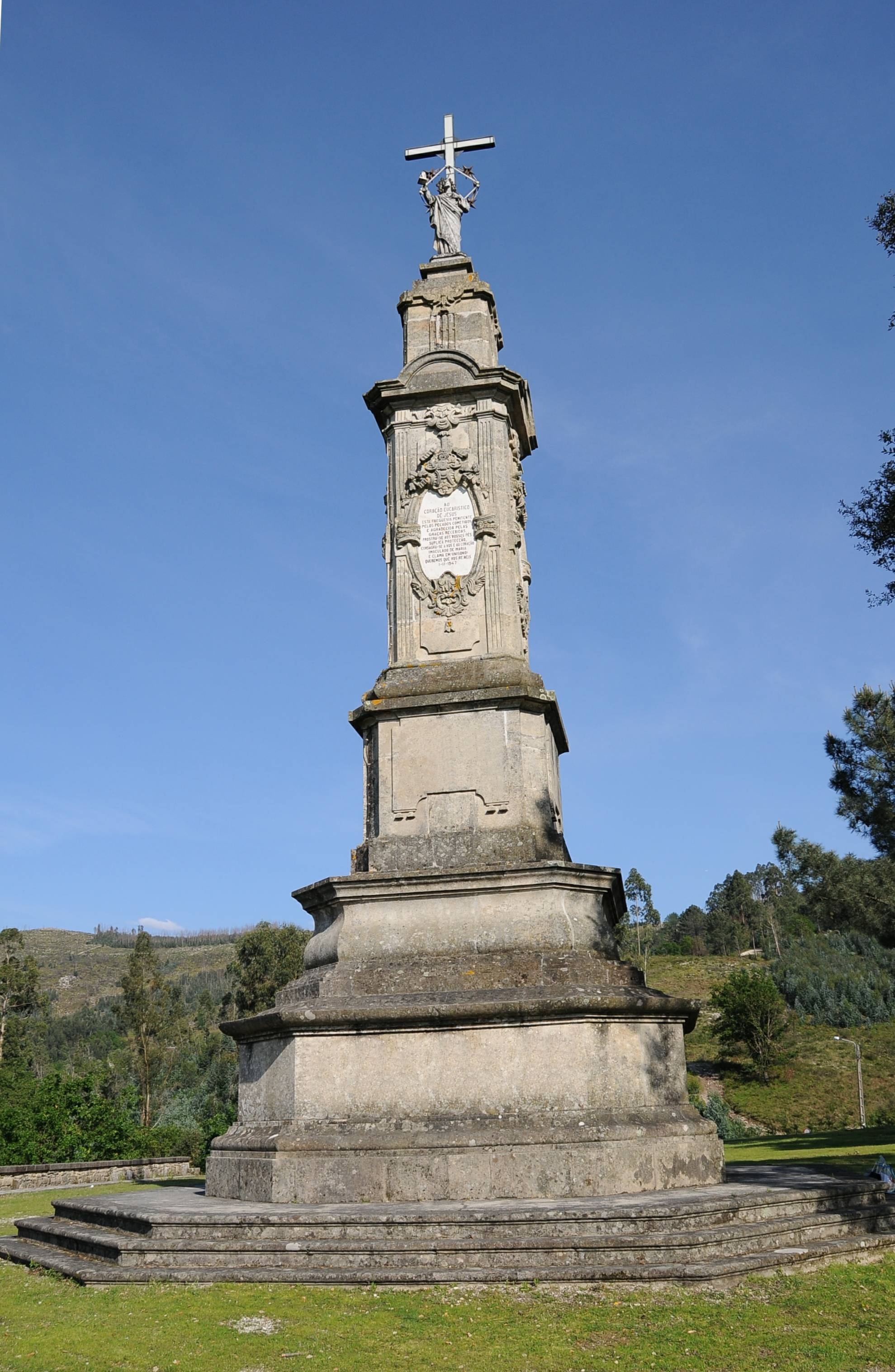 Statue in Chamor Hill, São Mamede de Este, Braga, Portugal